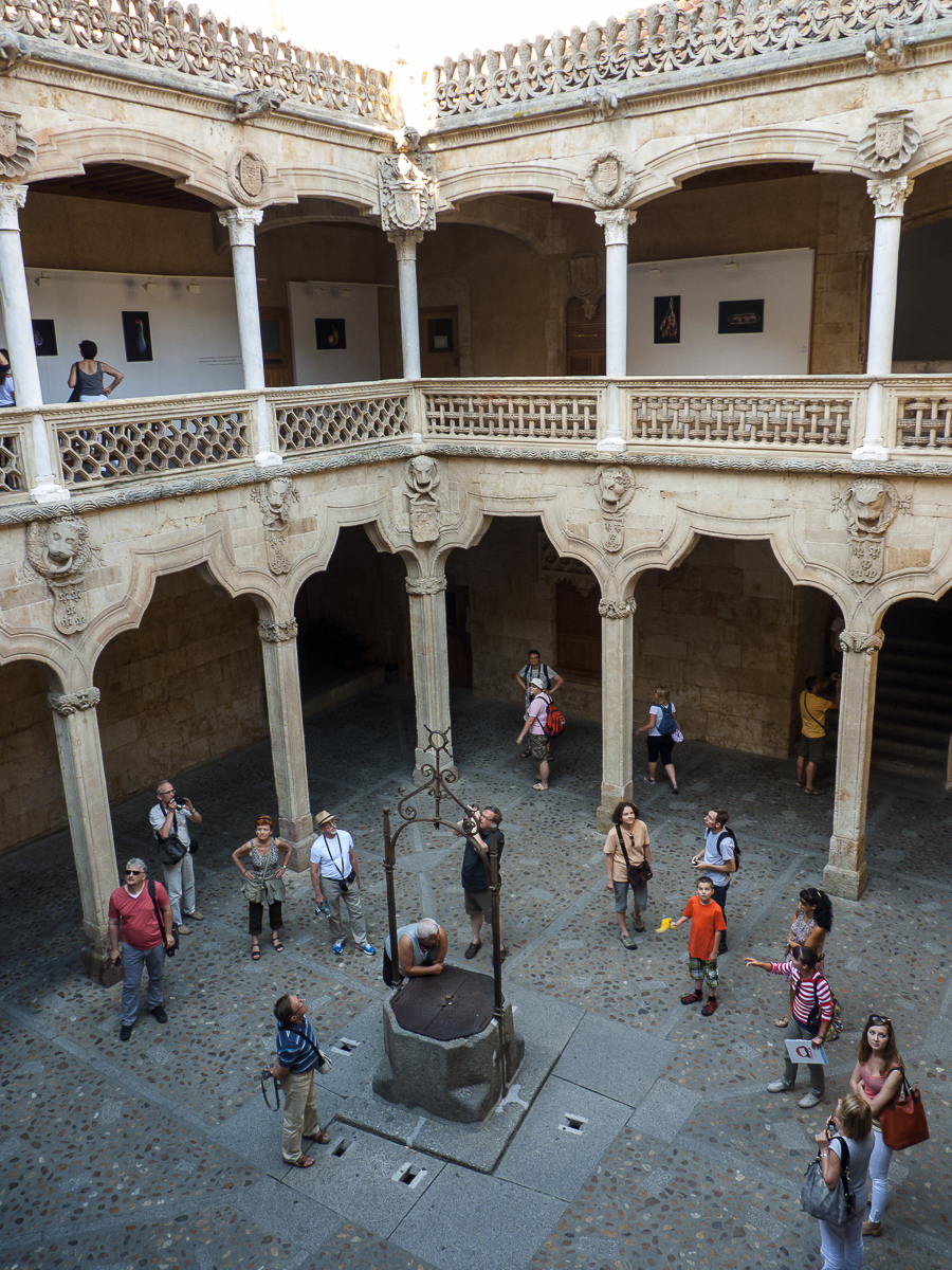 02082013 180707 SALAMANCA 0089